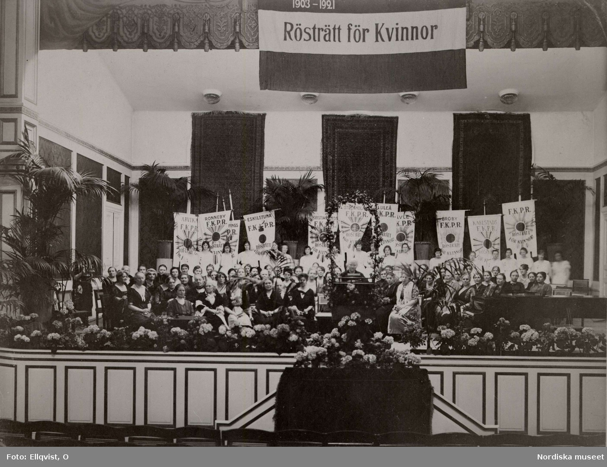 Landsföreningen för kvinnans politiska rösträtt. Möte på Musikaliska akademien till firande av rösträttssegern. Ellen Key i talarstolen.